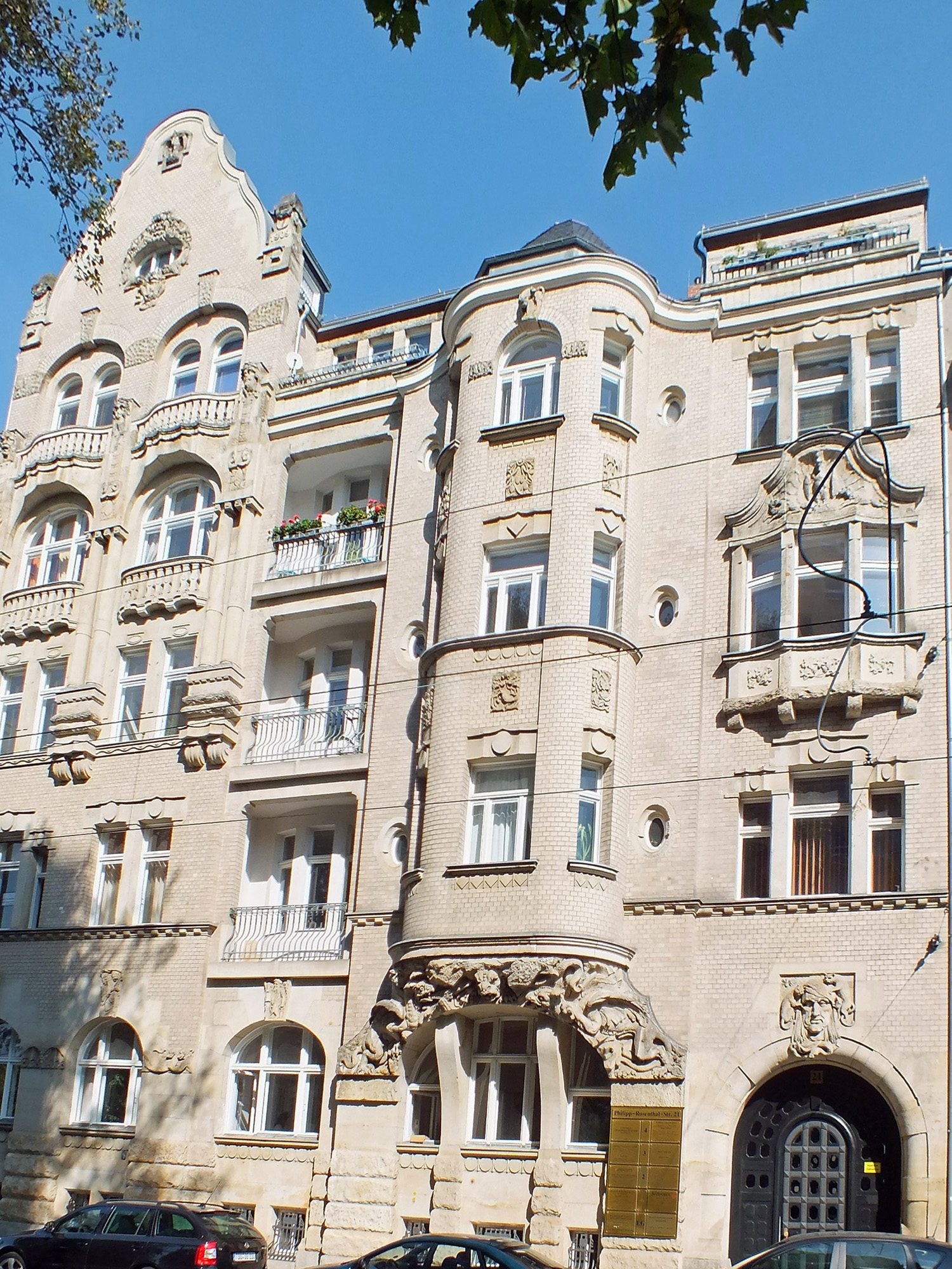 Das "Märchenhaus" in der Philipp-Rosenthal-Straße in Leipzig